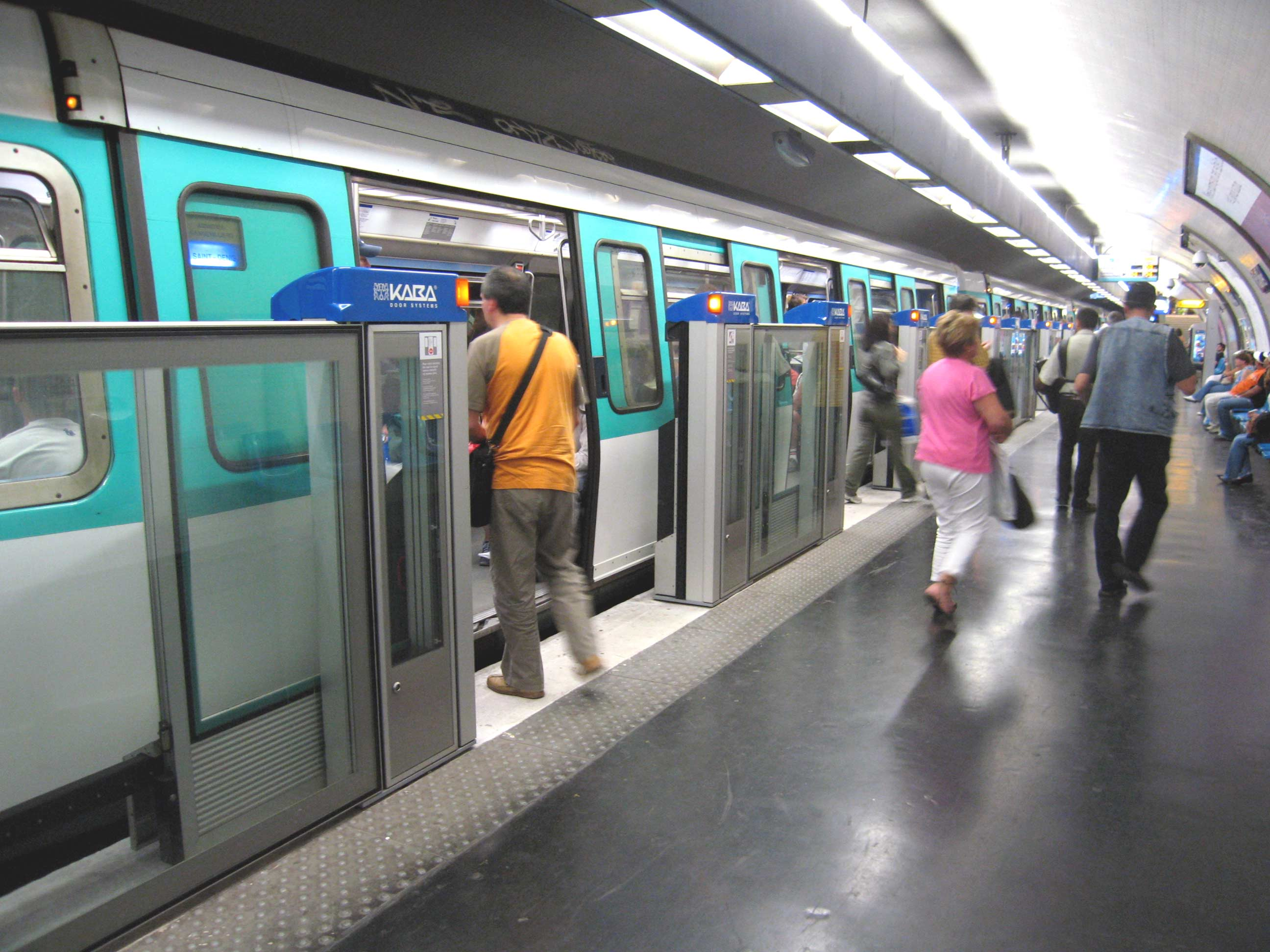 Description : Portes automatiques KABA en test sur la ligne 13 du métro à la station Invalides. Rame de type MF77 Place : Paris, France Date : juin 2006 Author : Pline photo personnelle